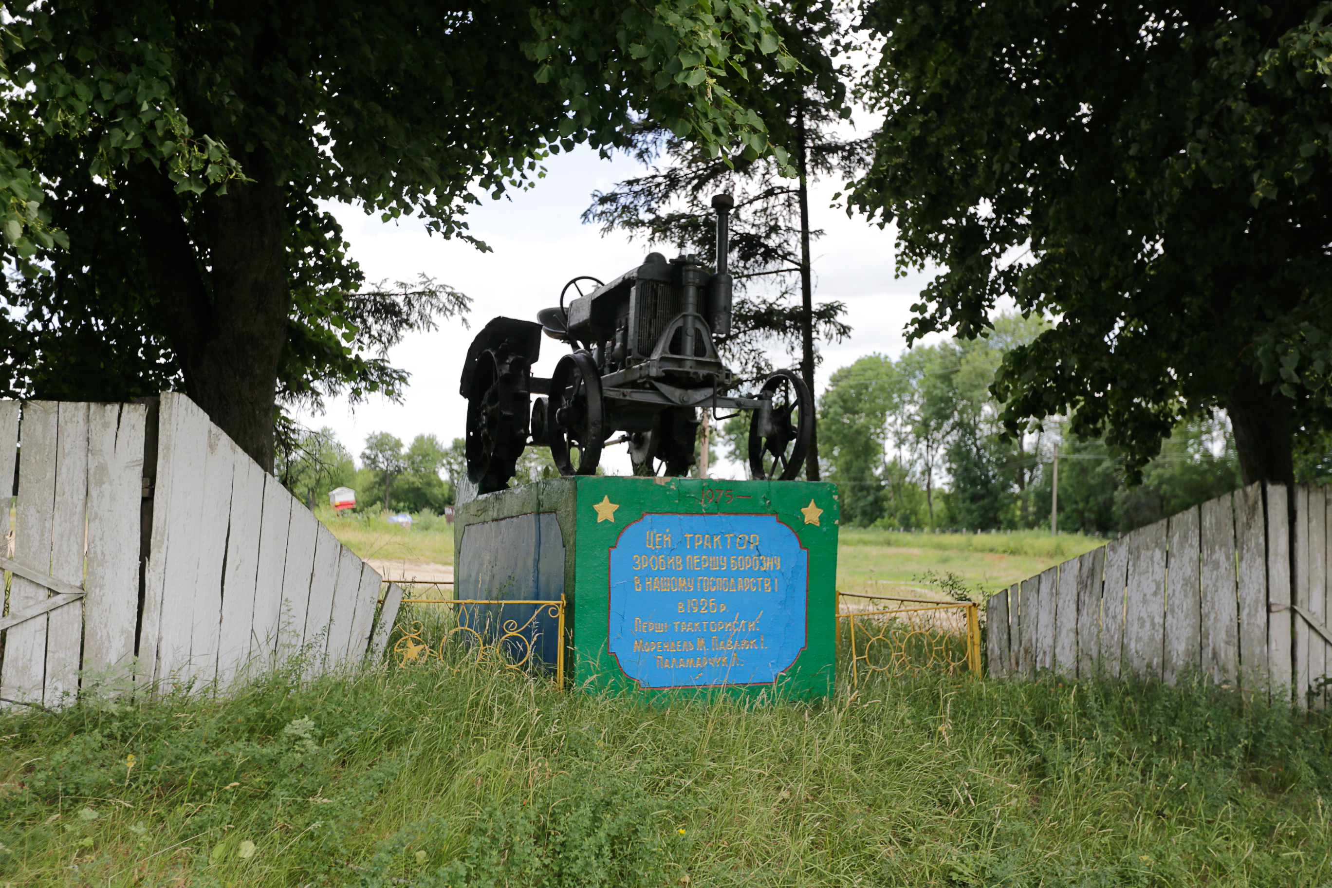 Пам'ятник першому трактору. с. Гули. Винницкая область.